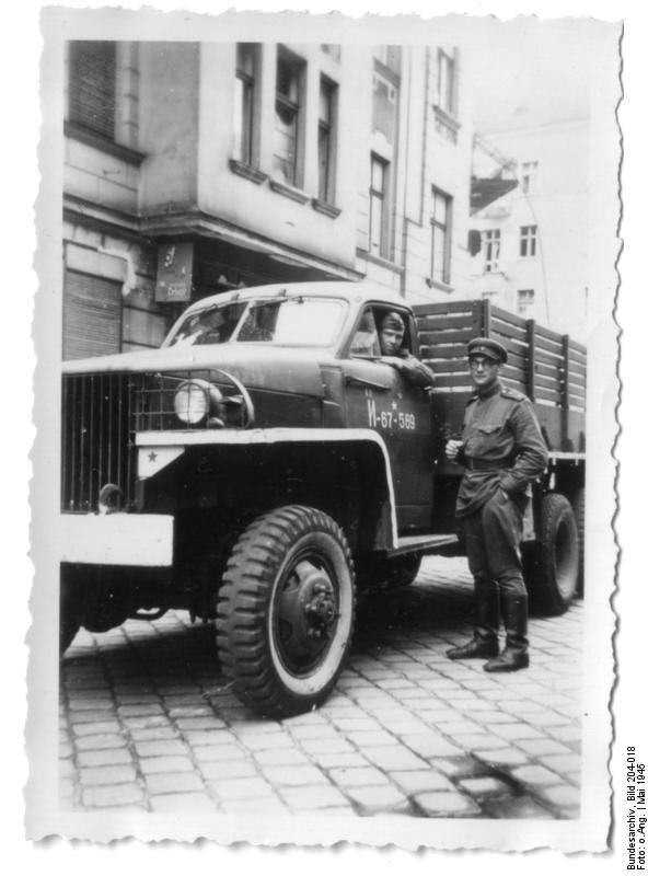 Berlin, Henryk Gorovits neben russischem LKW Berlin.- Henryk Gorovits neben sowjetischem LKW aus amerikanischer Produktion stehend, am Steuer sowjetischer Soldat; Anfang Mai 1945 Abgebildete Personen: Gorovits, Henryk: 1912-; sowjetischer Offizier, Polen#